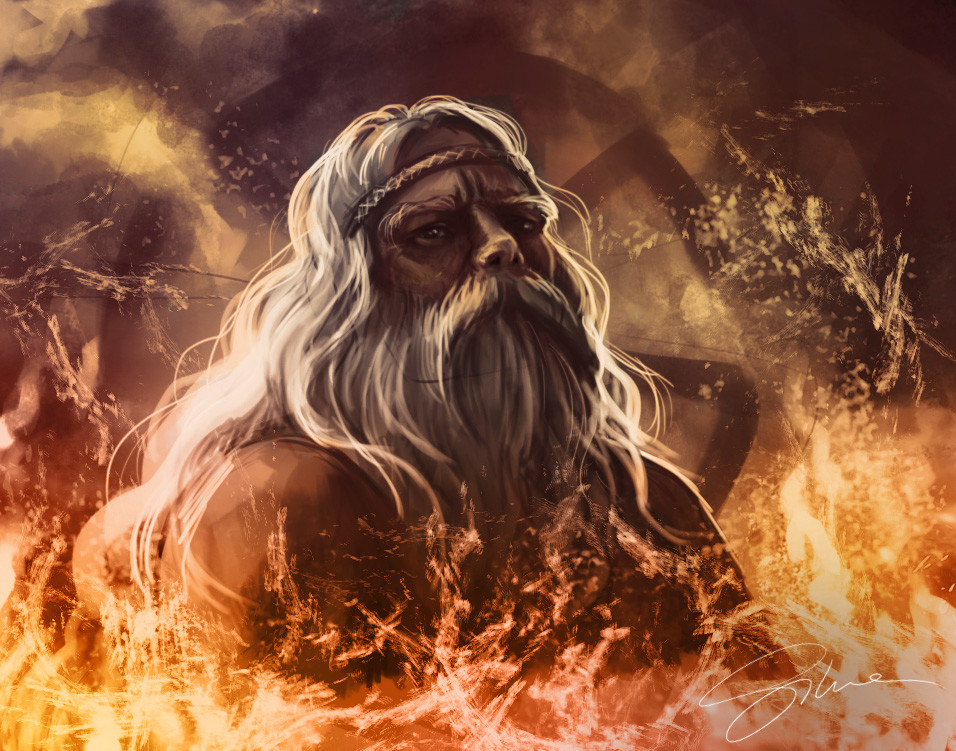 Swaróg (2016), autor: Dominika Sikora – makota